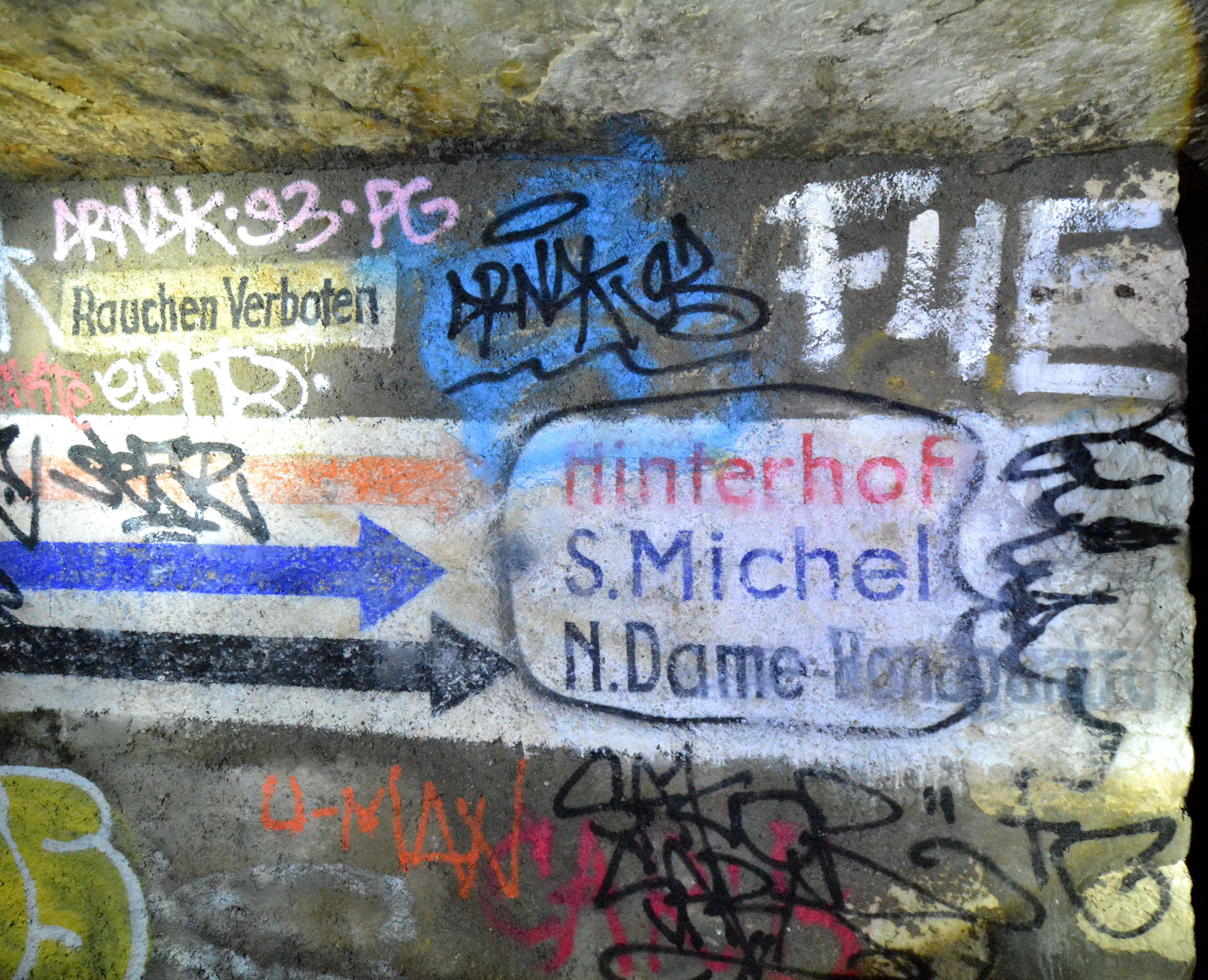 Inscriptions dans le bunker allemand sous le lycée Montaigne à Paris.